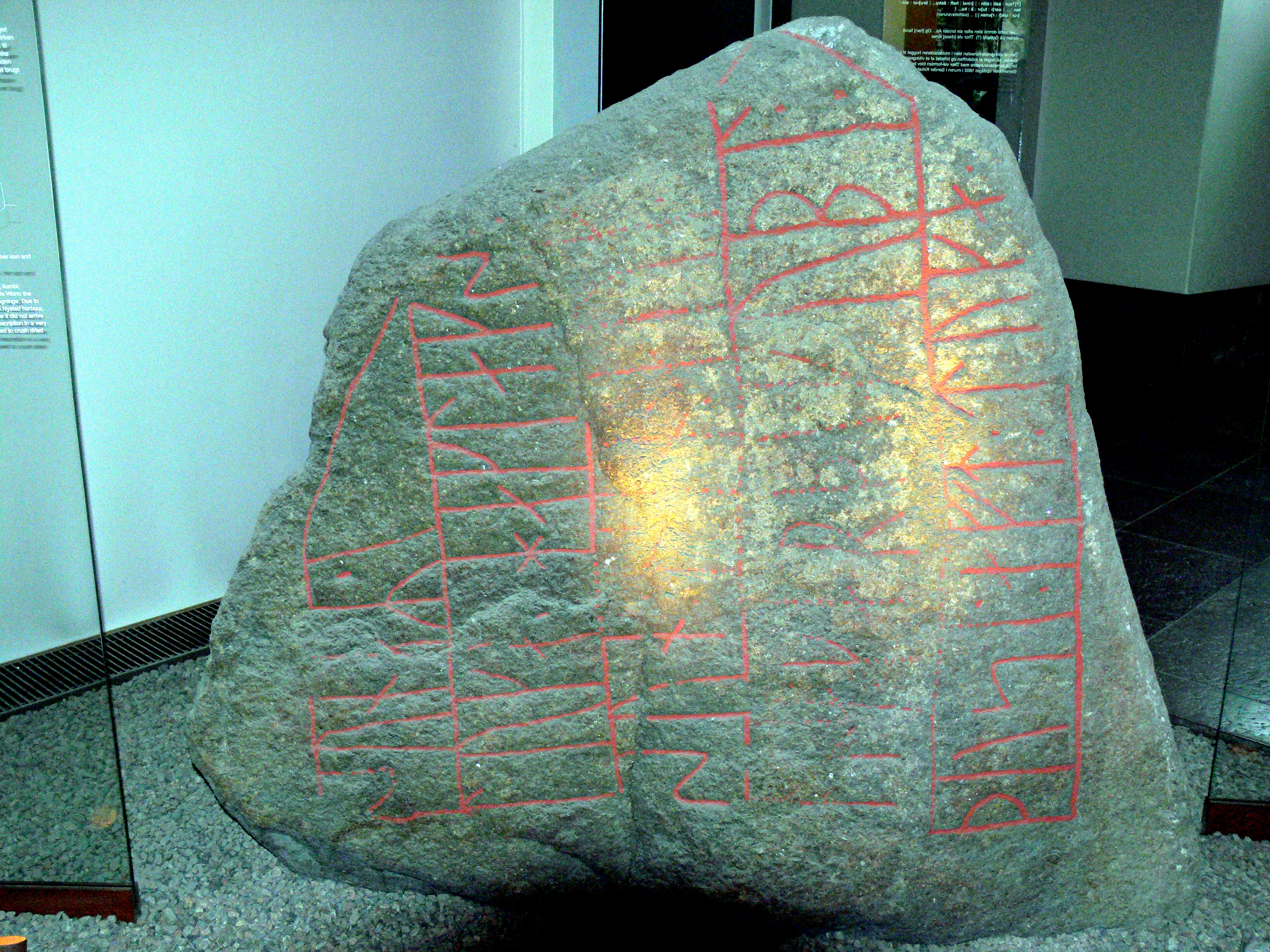 Runenstein von Bregninge (Lolland) im Museum Kopenhagen. Inschrift: “Åse machte diesen Gedenkstein nach Toke, ihres und Toke Haklangs Sohns Sohn.”